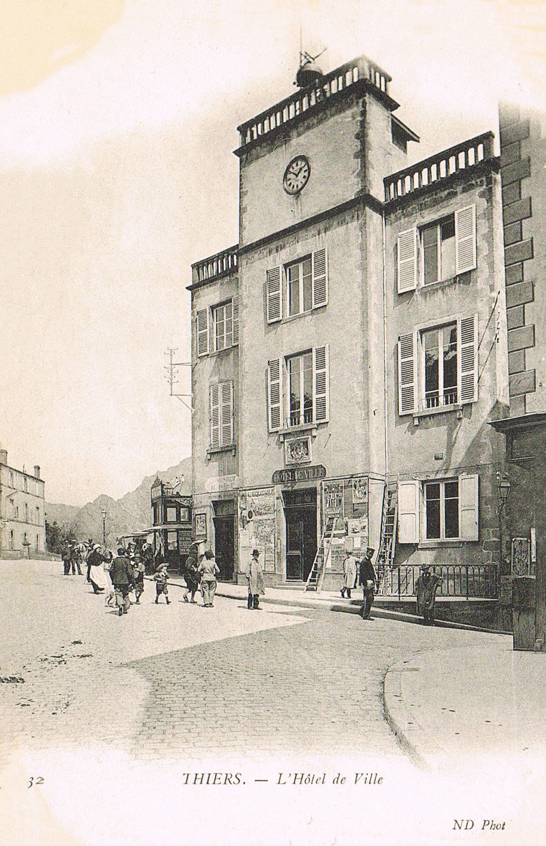 L'ancienne mairie de Thiers en 1910.